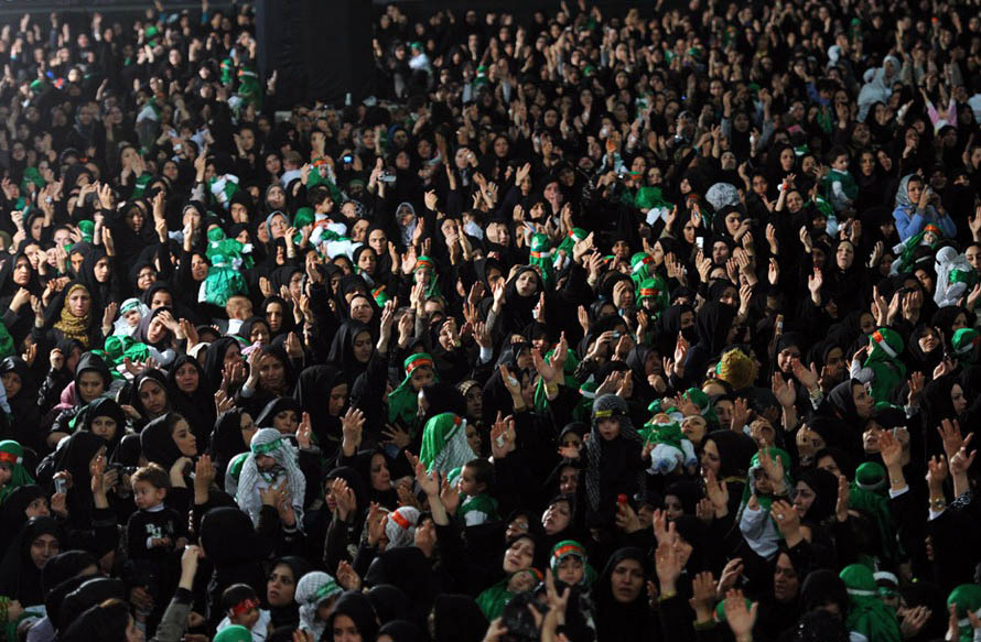 همایش شیرخوارگان حسینی در مصلی تهران- محرم 1390 شمسی